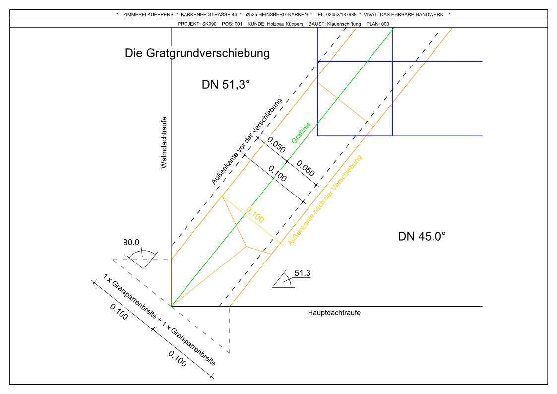 Die_Gratgrundverschiebung